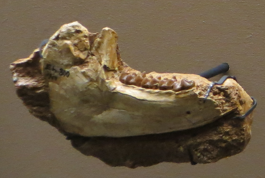 Fossil of Mixtotherium - Took the picture at Natural History Museum, Basel